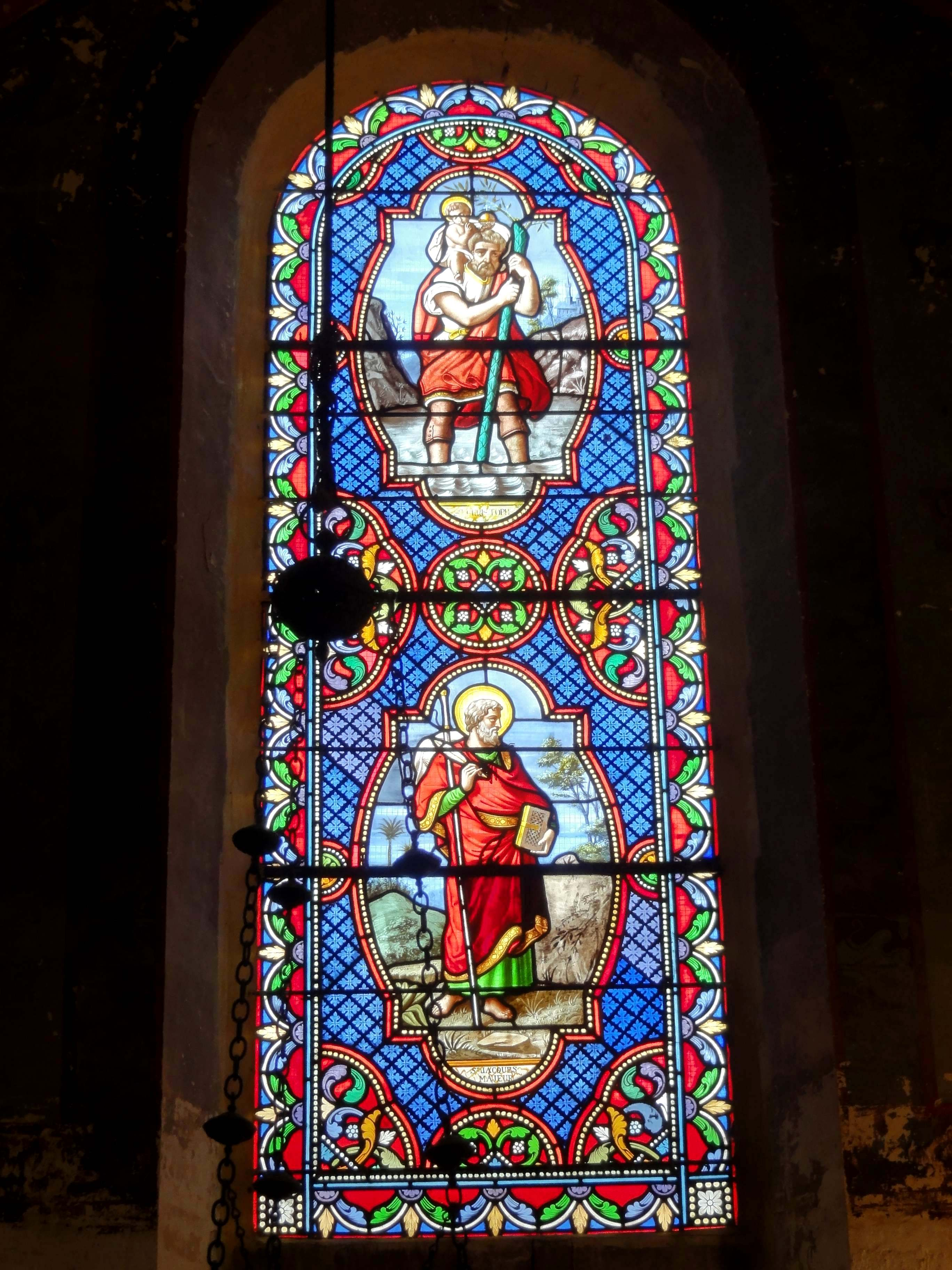 Mobilier de la chapelle - voir titre.